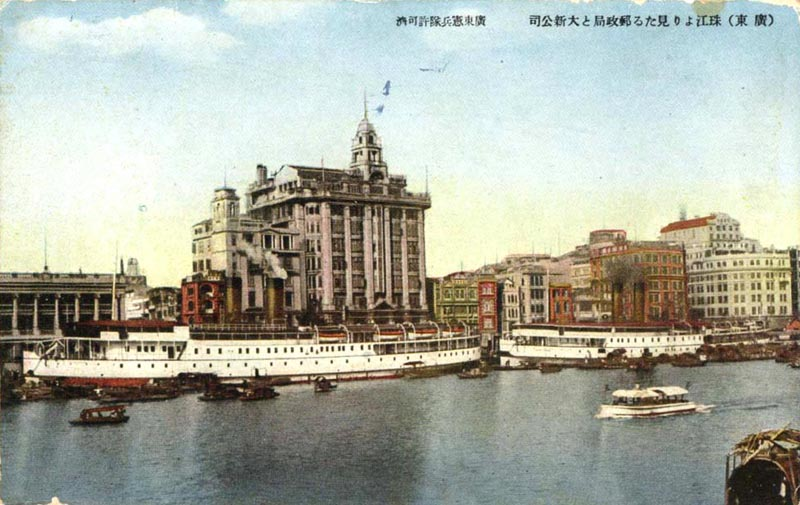 左至右：廣東郵務管理局及廣州西堤大新公司，現為南方大廈及廣州郵政博覽館。最右為嘉南堂（南樓），現新華大酒店。